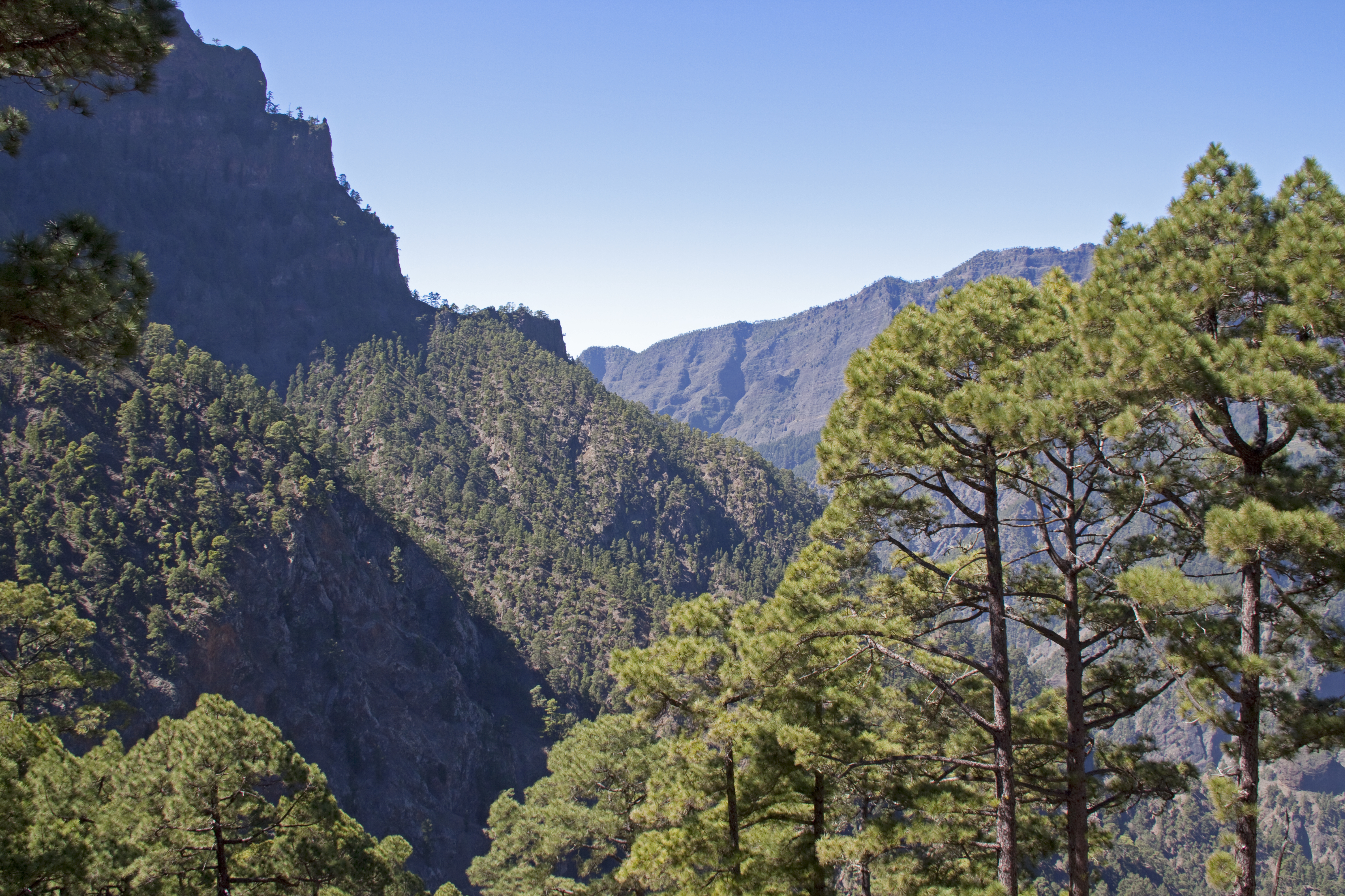 Inside the Caldera de Taburiente 7